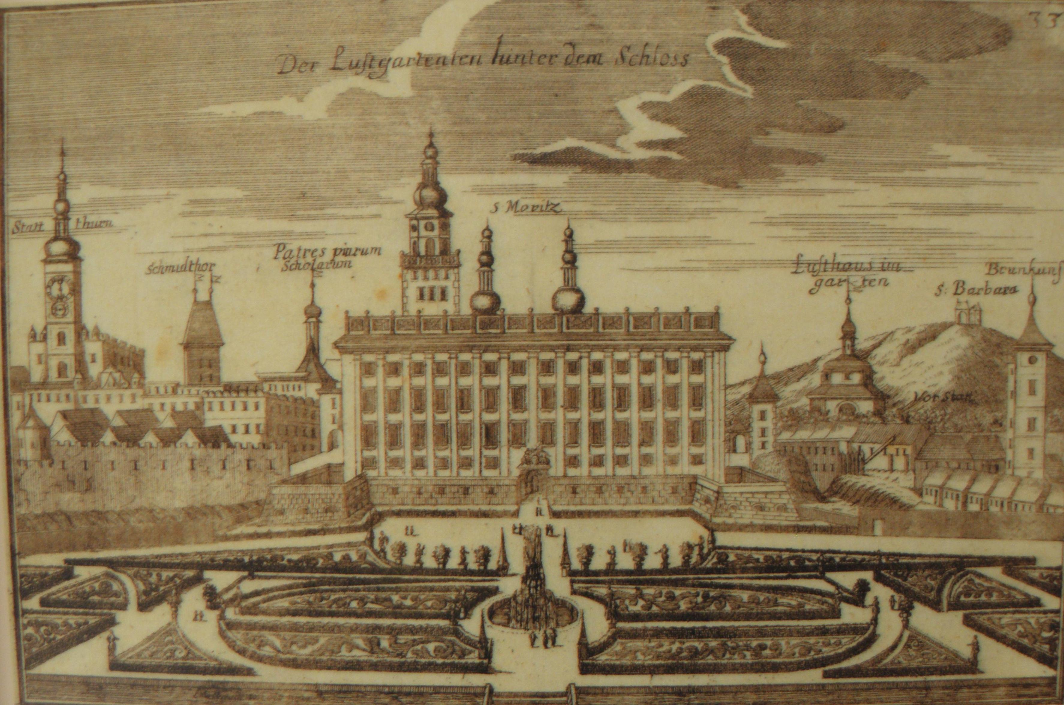 Veduta Kroměříže s parterem před zámkem